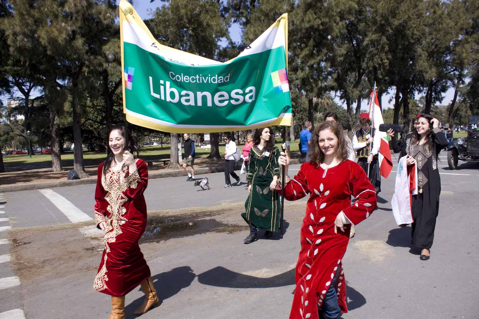 Dia del inmigrante 025